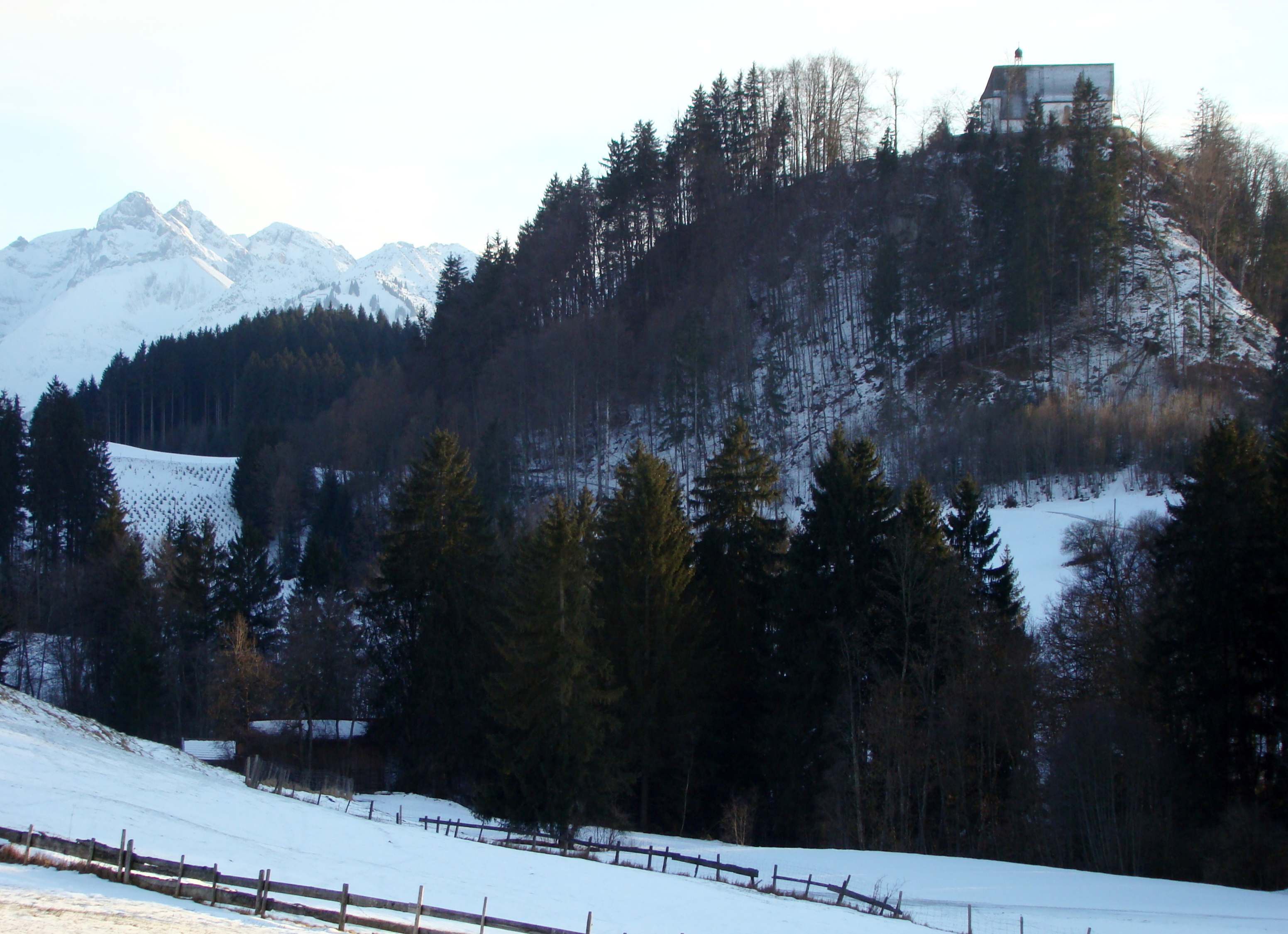 Burgkirche St. Michael bei Schöllang (Allgäu)